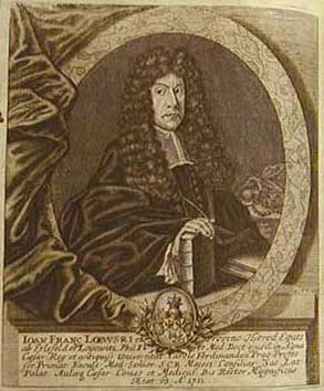 Johann Franz Ritter Loew von Erlsfeld (1648-1725) in the year 1711 in Prague